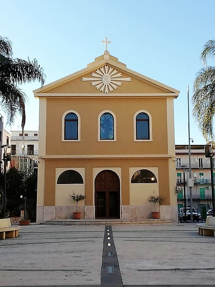 Chiesa di San Francesco di Paola. Piazzale.